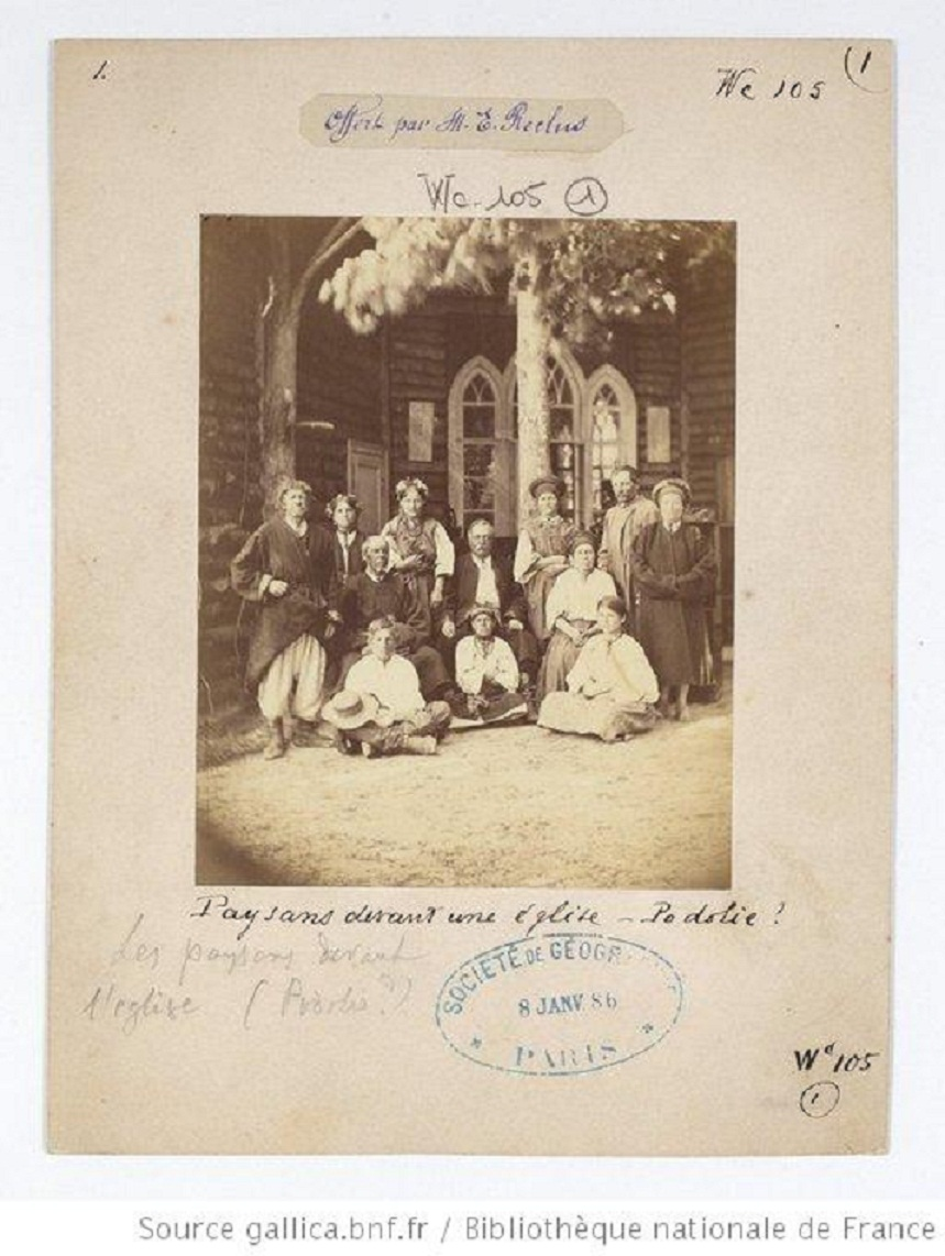 Podolia. Ukraine